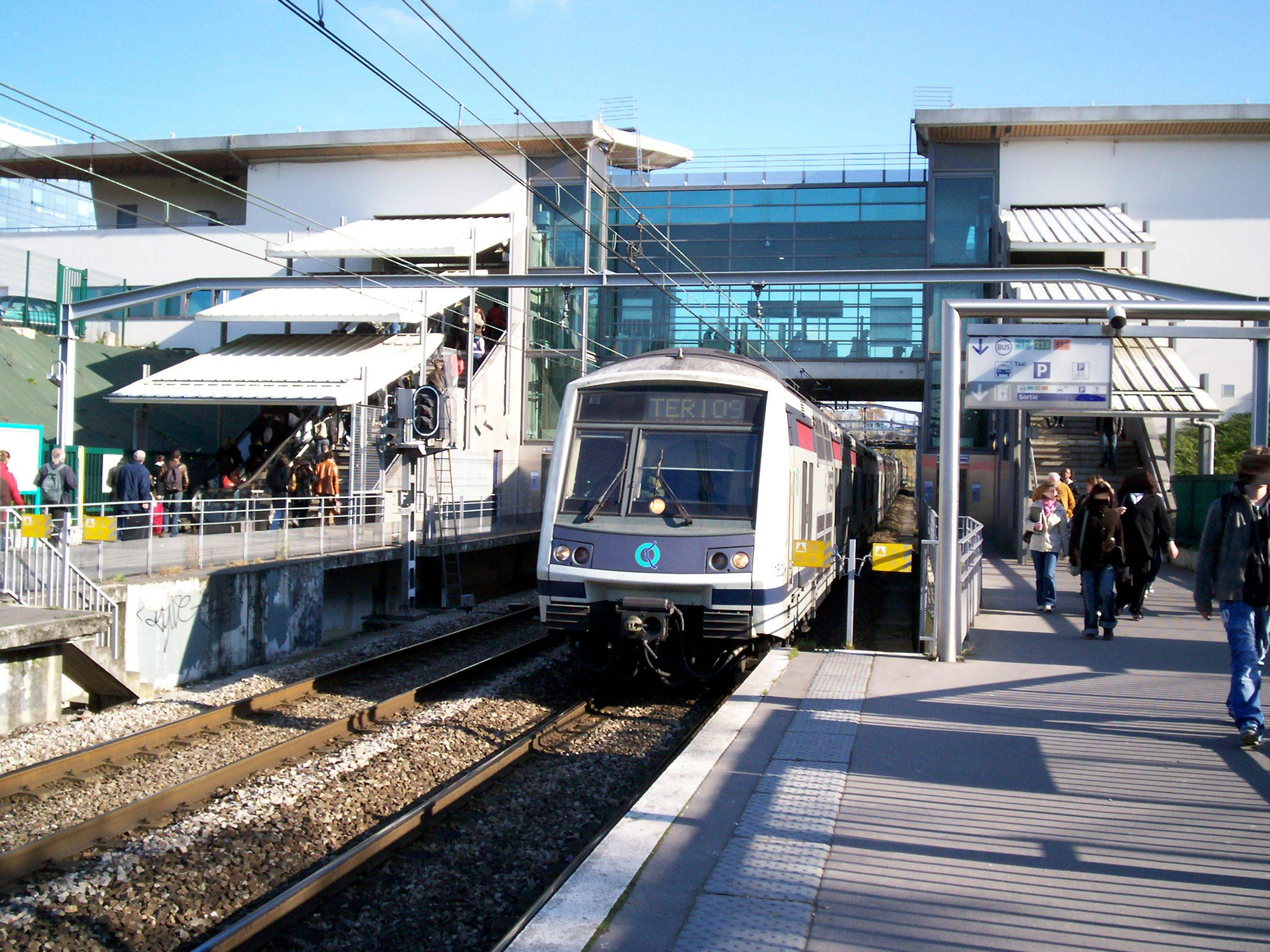 Rame MI 2N Altéo arrivant à Noisy-Champs